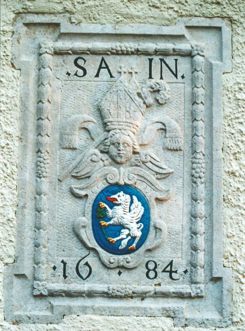 Dischingen, Ortsteil Hochstatt, Wappenplatte von 1684 mit dem Wappen des Abts des Klosters Neresheim Simpert Niggl